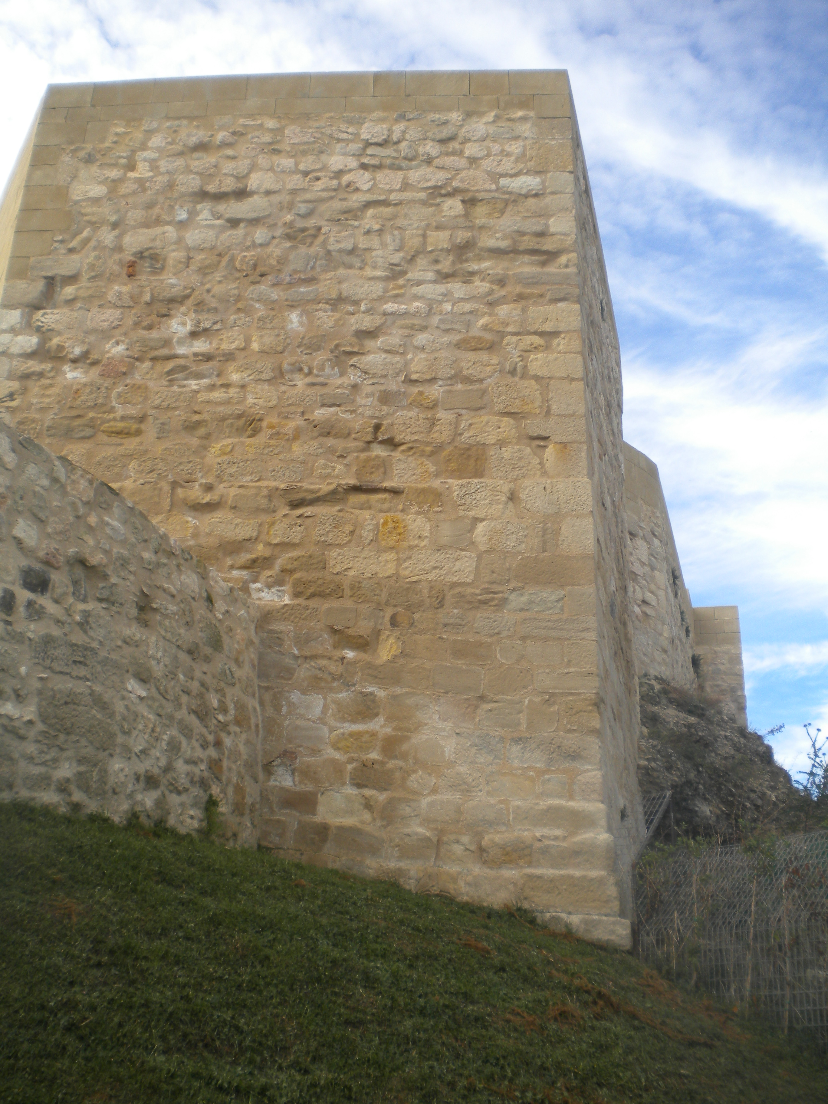 Batería del Rey del Castillo de Miranda de Ebro (Castilla y León, España)